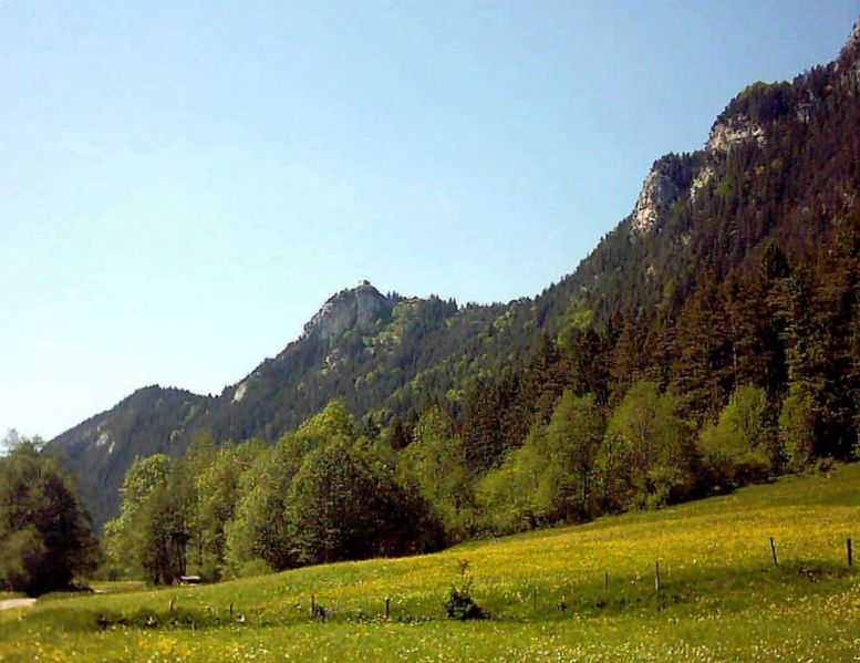 Burg Falkenstein bei Pfronten (Allgäu, Bayern). Ansicht von der Staatsgrenze im Vilstal. Eigene Aufnahme, Sommer 2004 / Falkenstein castle near Pfronten (Bavaria, Germany). View from the Vils valley (Border between Bavaria and Tirol). Own photo, Summer 2004